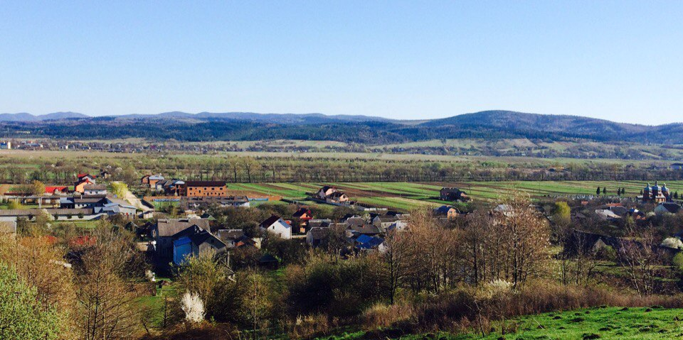 Панорама с. Торчиновичі. Весна 2017р.